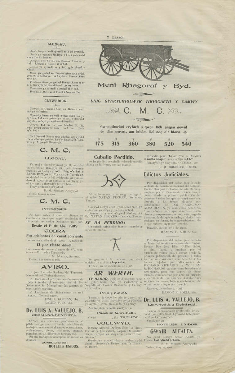 Copia del periódico Y Drafod publicado el 8 de enero de 1909.